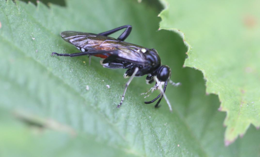 Pflanzenwespe Macrophya militaris am 5. Juni 2019 in der Schwetzinger Hardt